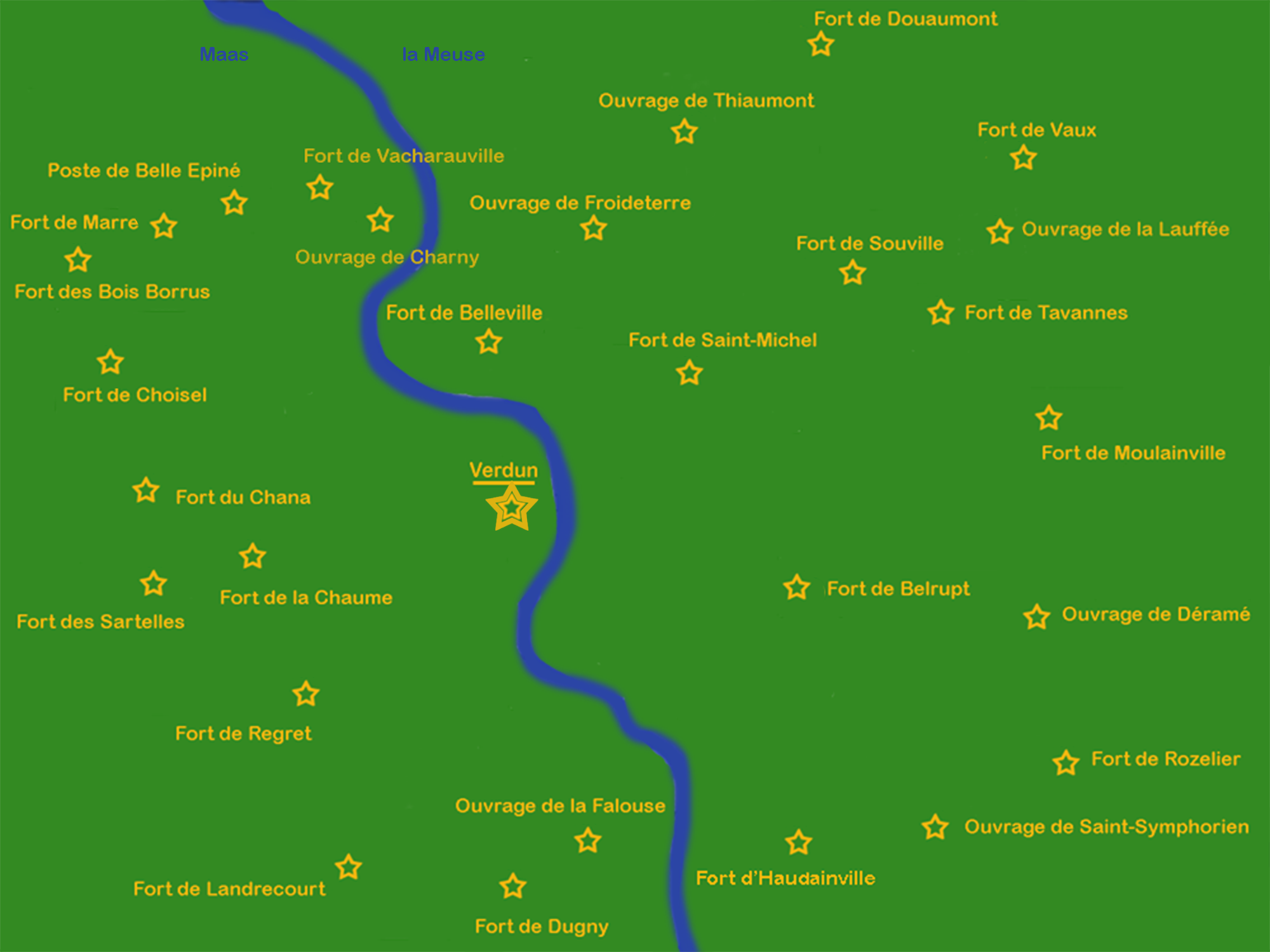 Lageplan der Forts von Verdun